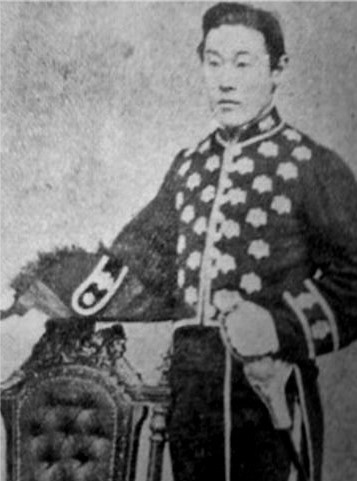 醍醐忠敬の肖像写真。